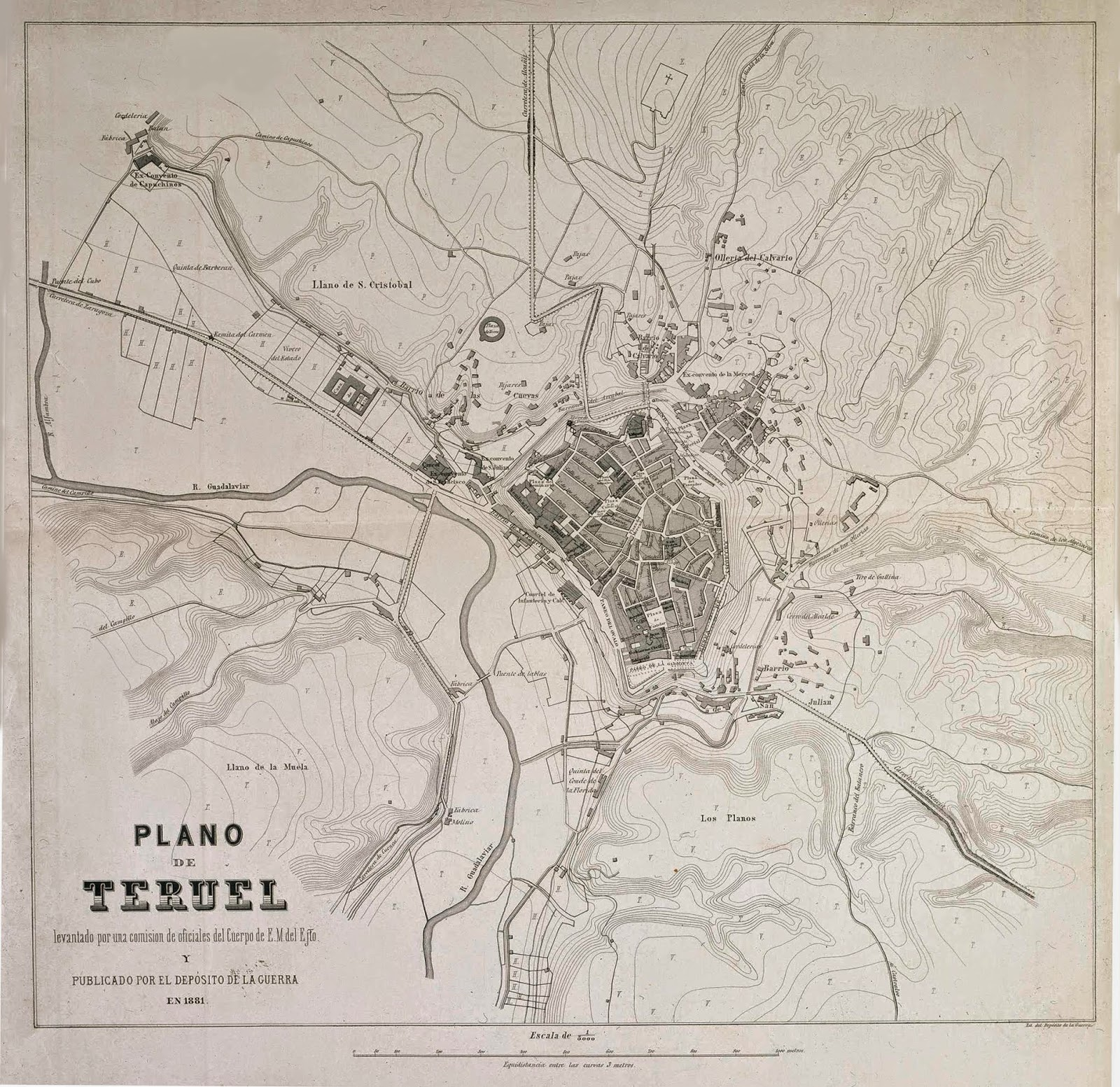 Plano de Teruel levantado por una Comisión de Oficiales del Cuerpo de E.M. del Ejto. Escala 1:5.000.